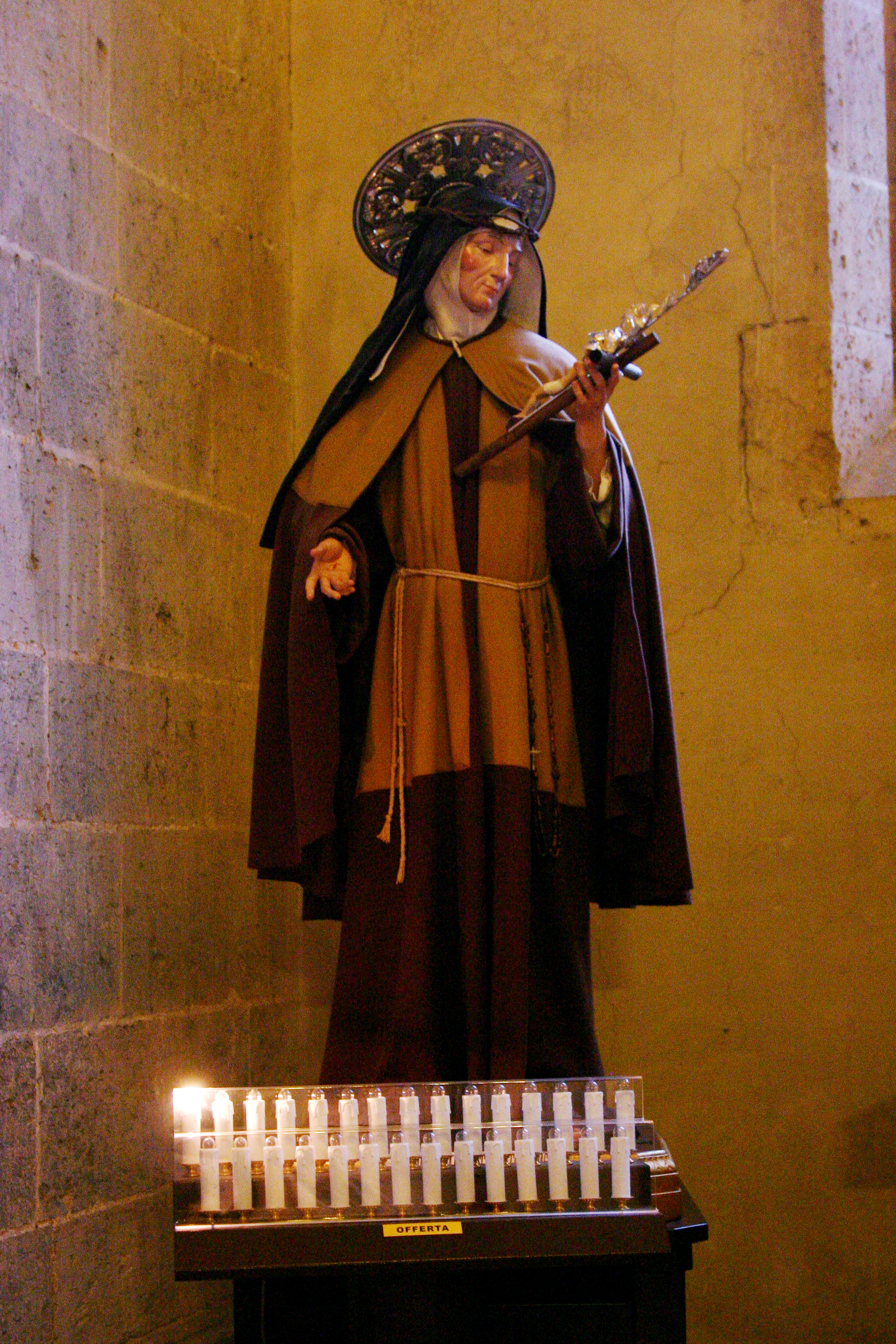 Santa Chiara - Naples